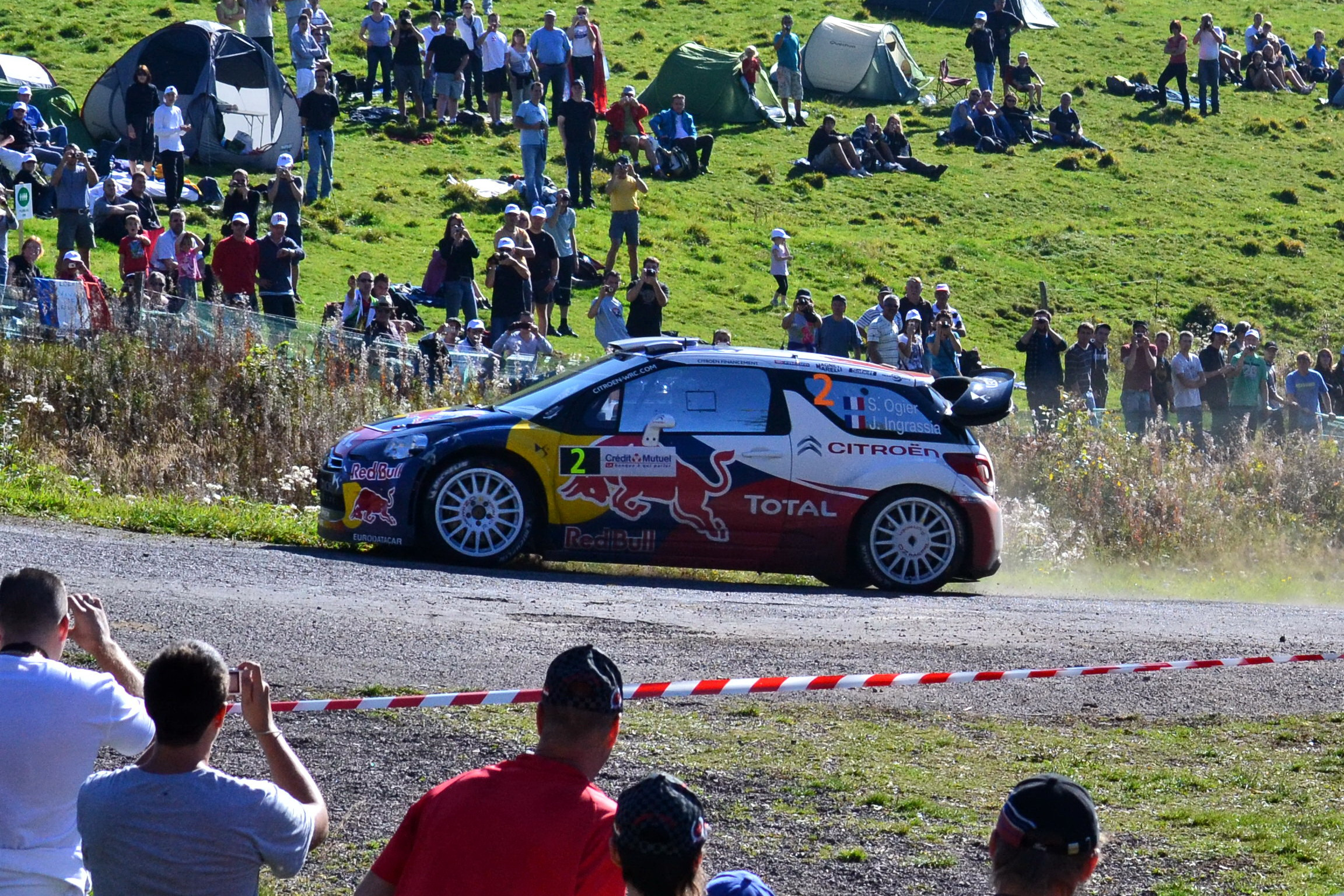 Rallye WRC France 2011, ES12 Grand Ballon. Citroën DS3 WRC - Sébastien Ogier/J. Ingrassia